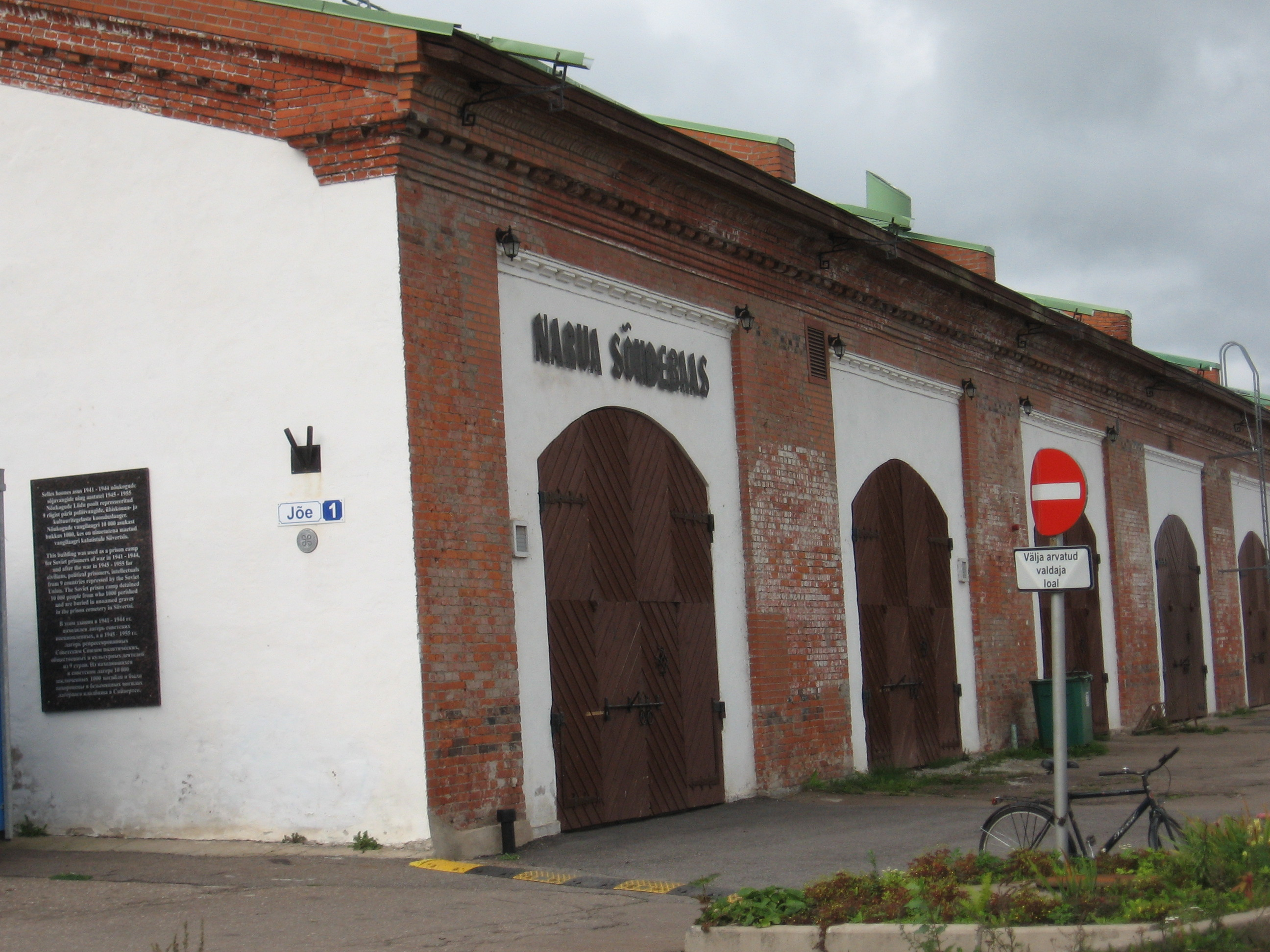 Kreenholmi sadamalaod